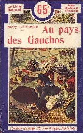 Couverture de Au pays des gauchos d'Henry Leturque, Paris, La Librairie illustrée [Editions Jules Tallandier], collection « Le Livre national - Romans d'aventures et d'explorations » vendu 65 centimes.